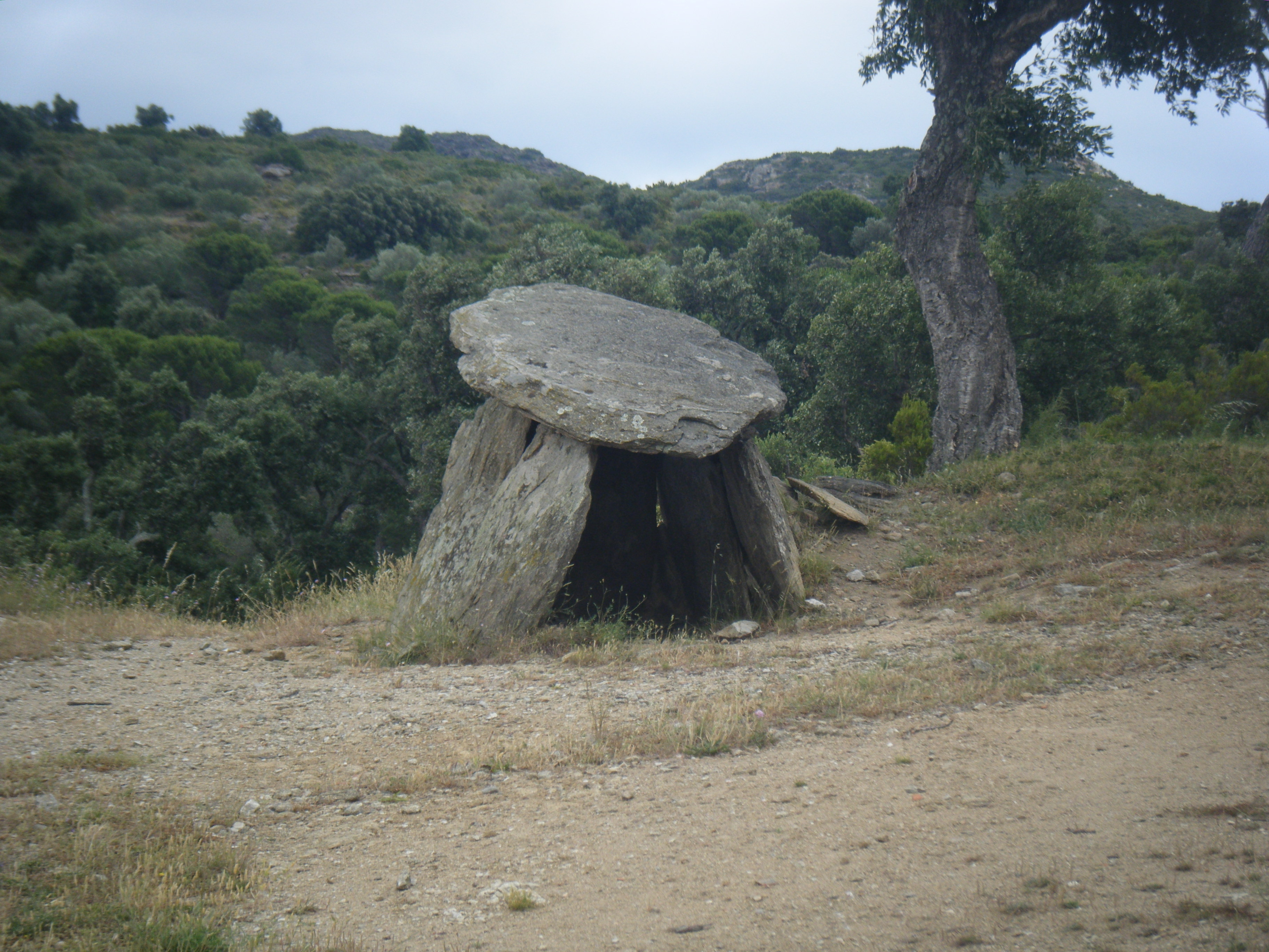 Dolmen del Cap de l'Home, Roses This is a a photo of a natural area in Catalonia, Spain, with id: ES510092